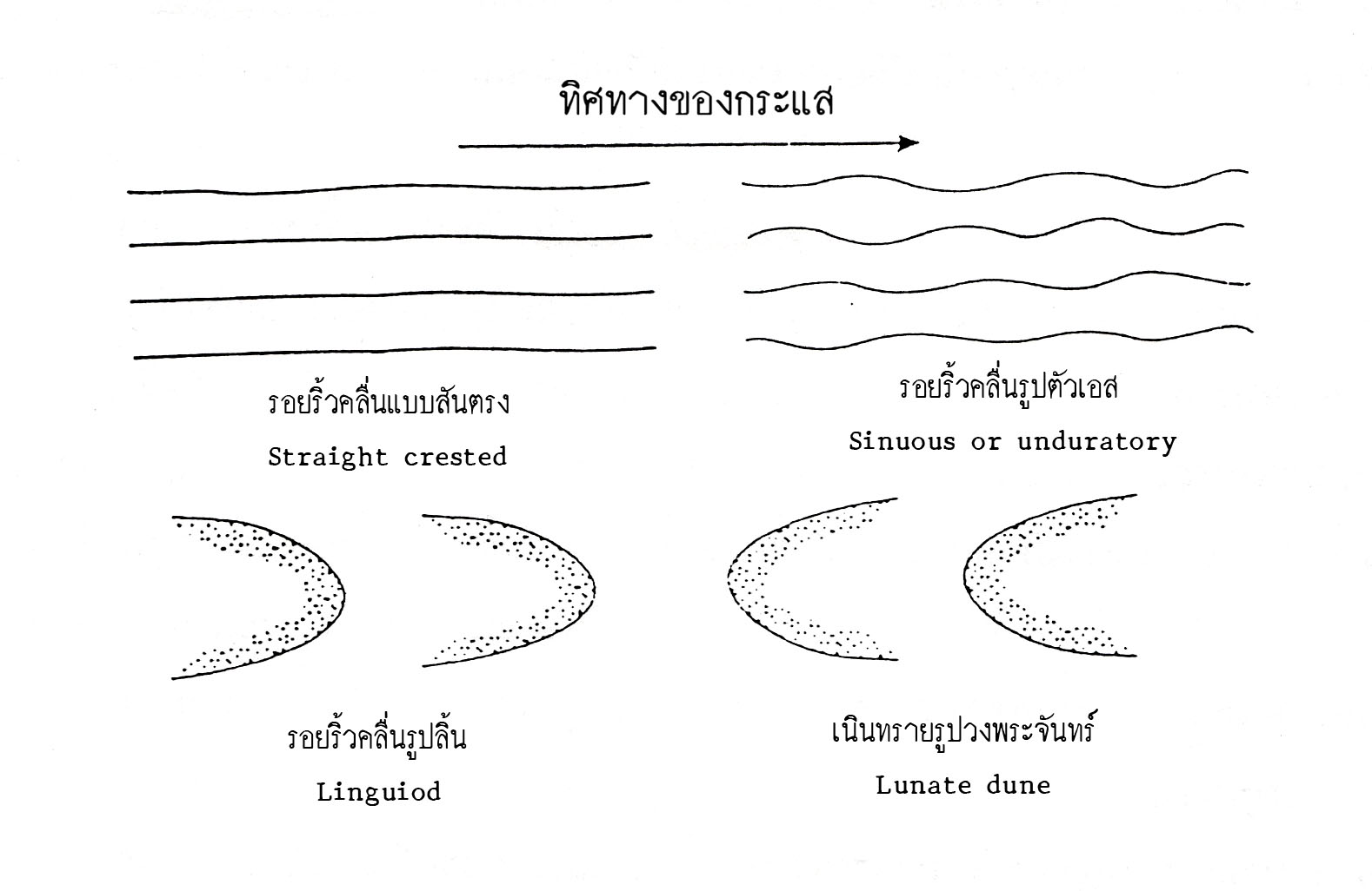 ลักษณะของรอยริ้วคลื่นต่างๆ แสดงทิศทางของกระแสน้ำหรือลมจากซ้ายไปขวา